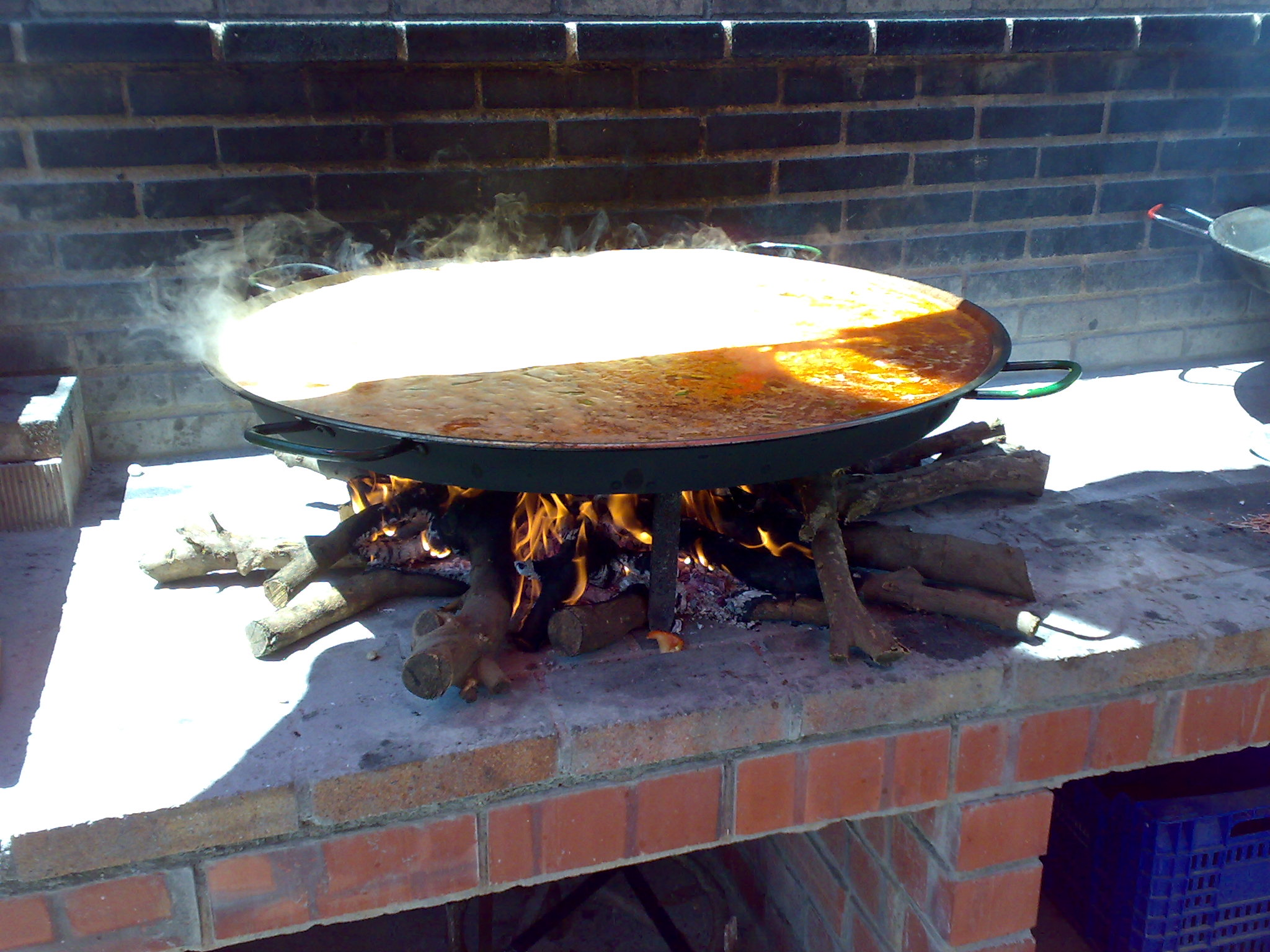 Una paella a la leña preparándose en Valencia